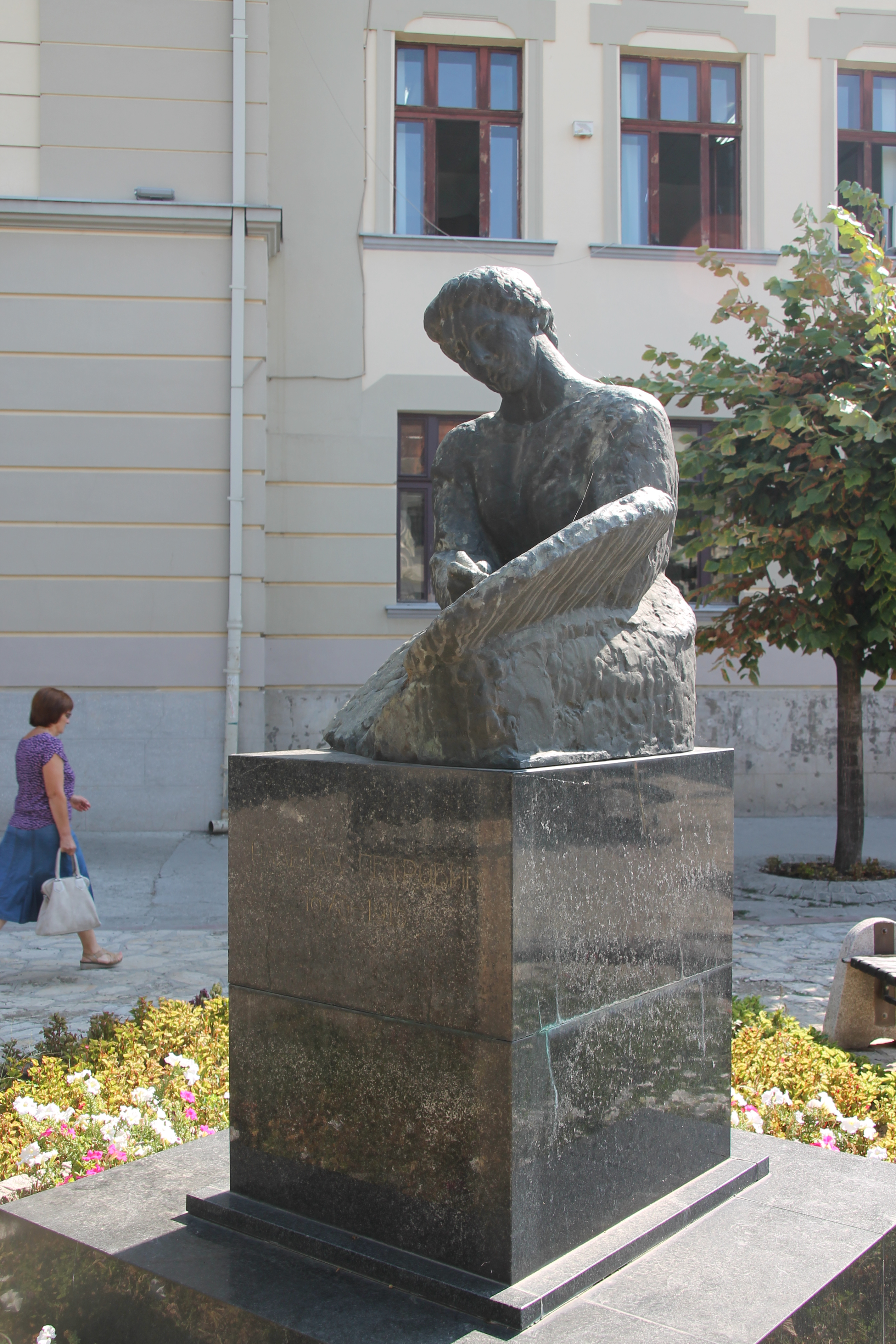 Zgrada gimnazije (Čačak)